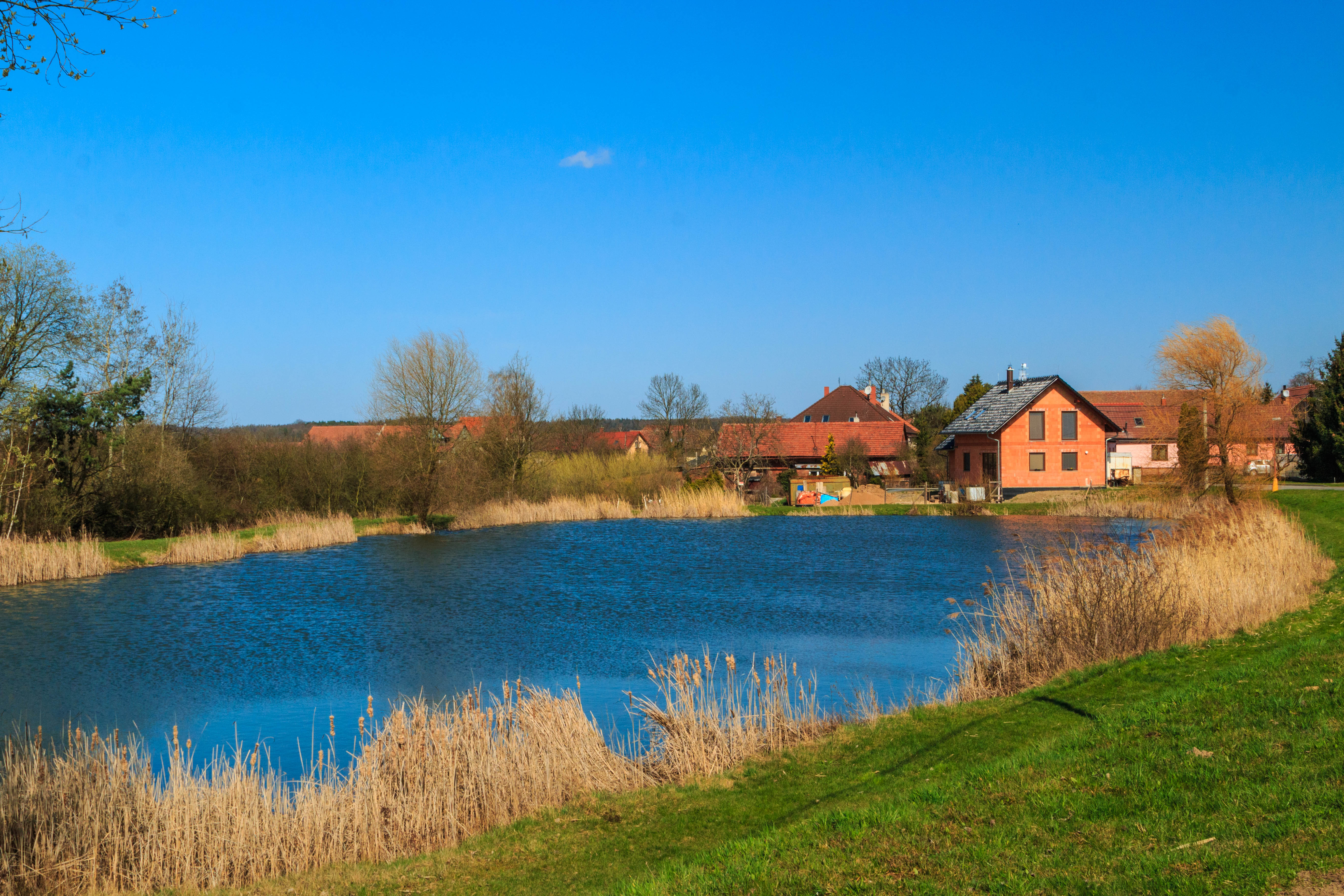 Rybník Písník u Barchova Project: Vodstvo.